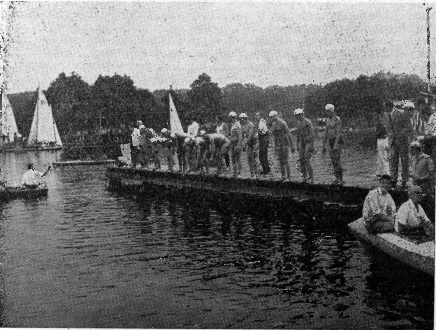 Wpław przez Kiekrz, zawody pływackie; 19-07-1967